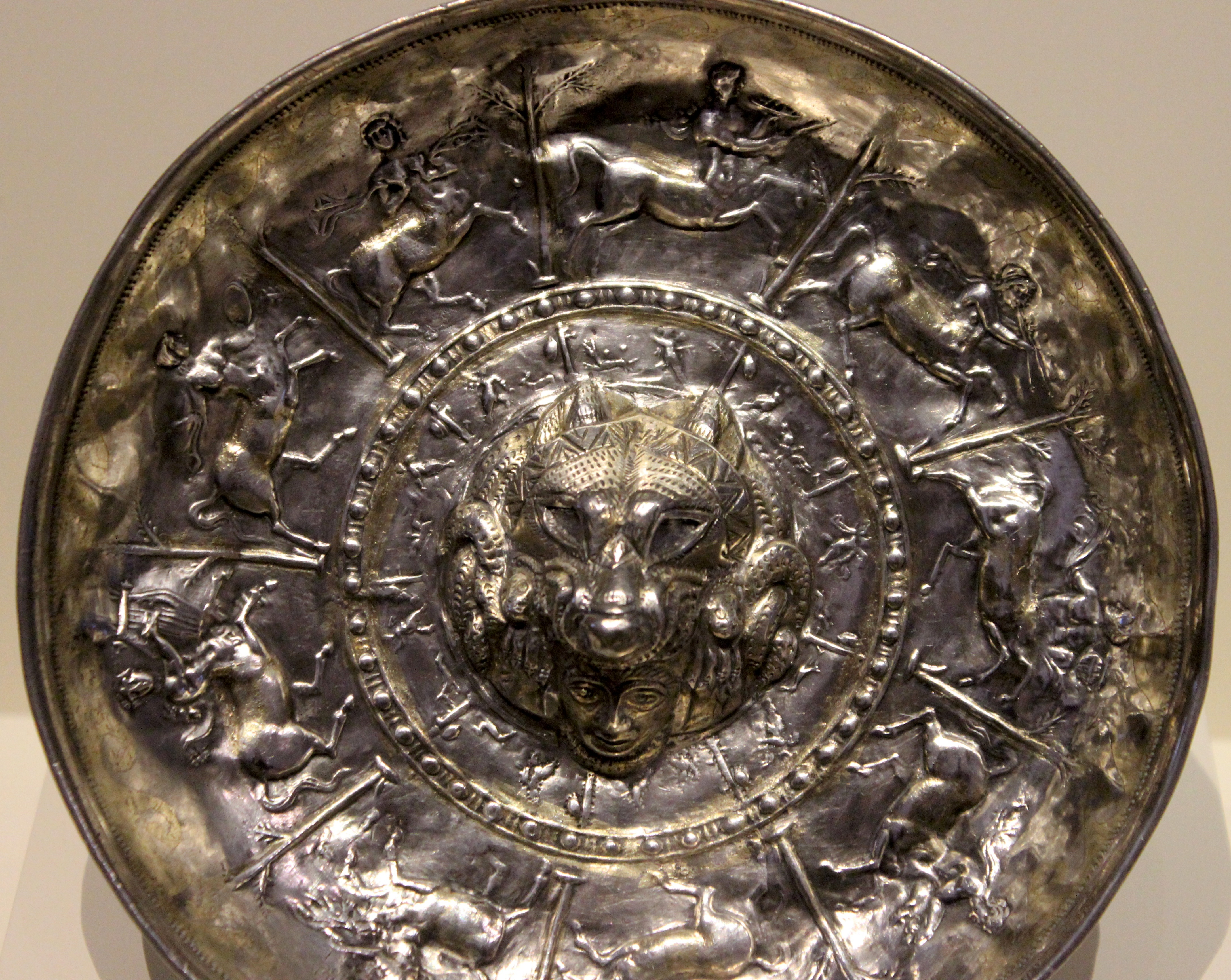 Madrid, M.A.N. Patera ibérica de plata procedente de Santisteban del Puerto (Jaén).